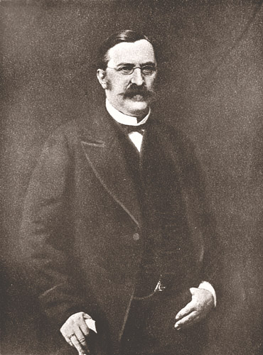 кн. Владимир Александрович Черкасский, российский общественный и государственный деятель, славянофил (1824-1878)